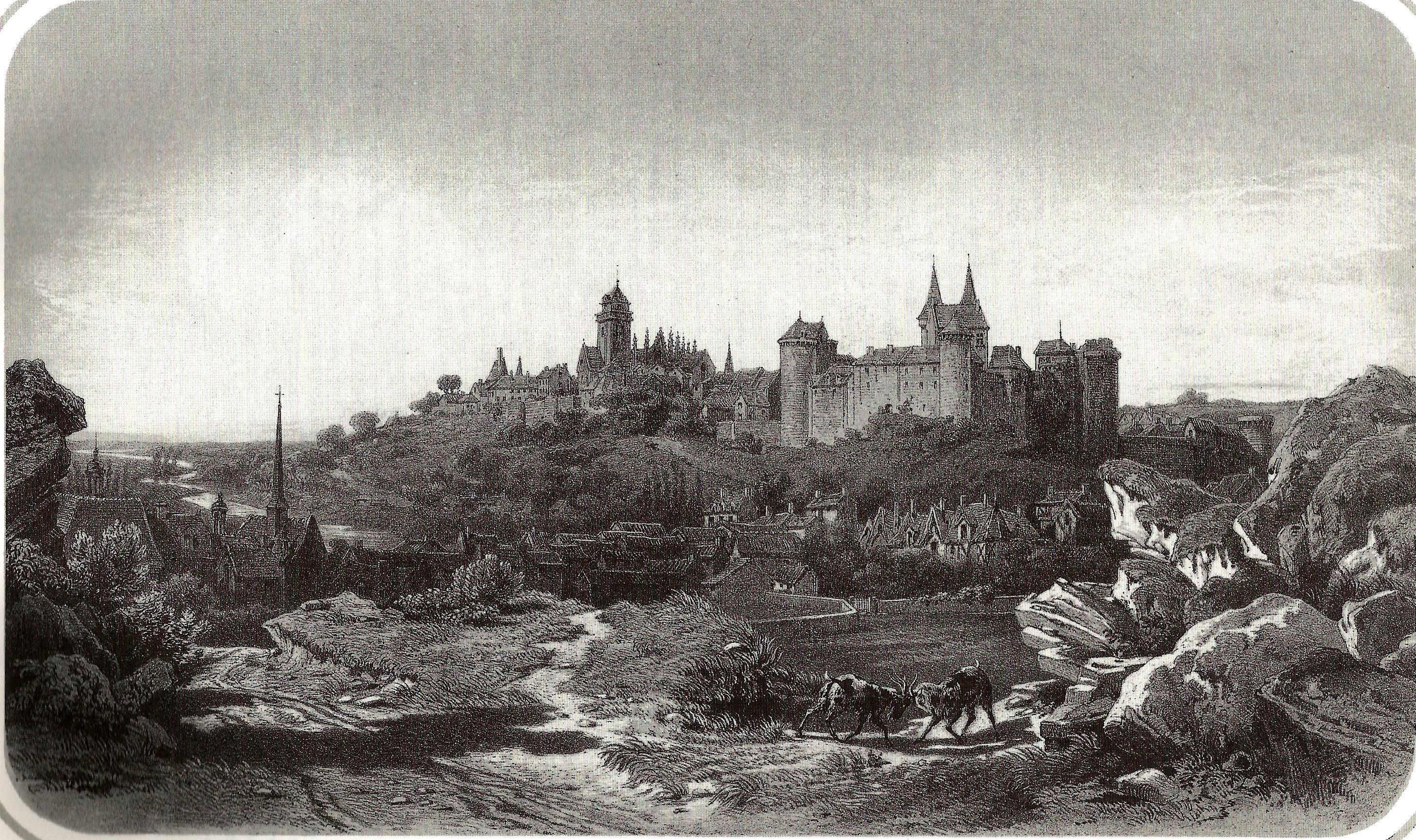 Vue de Vitré